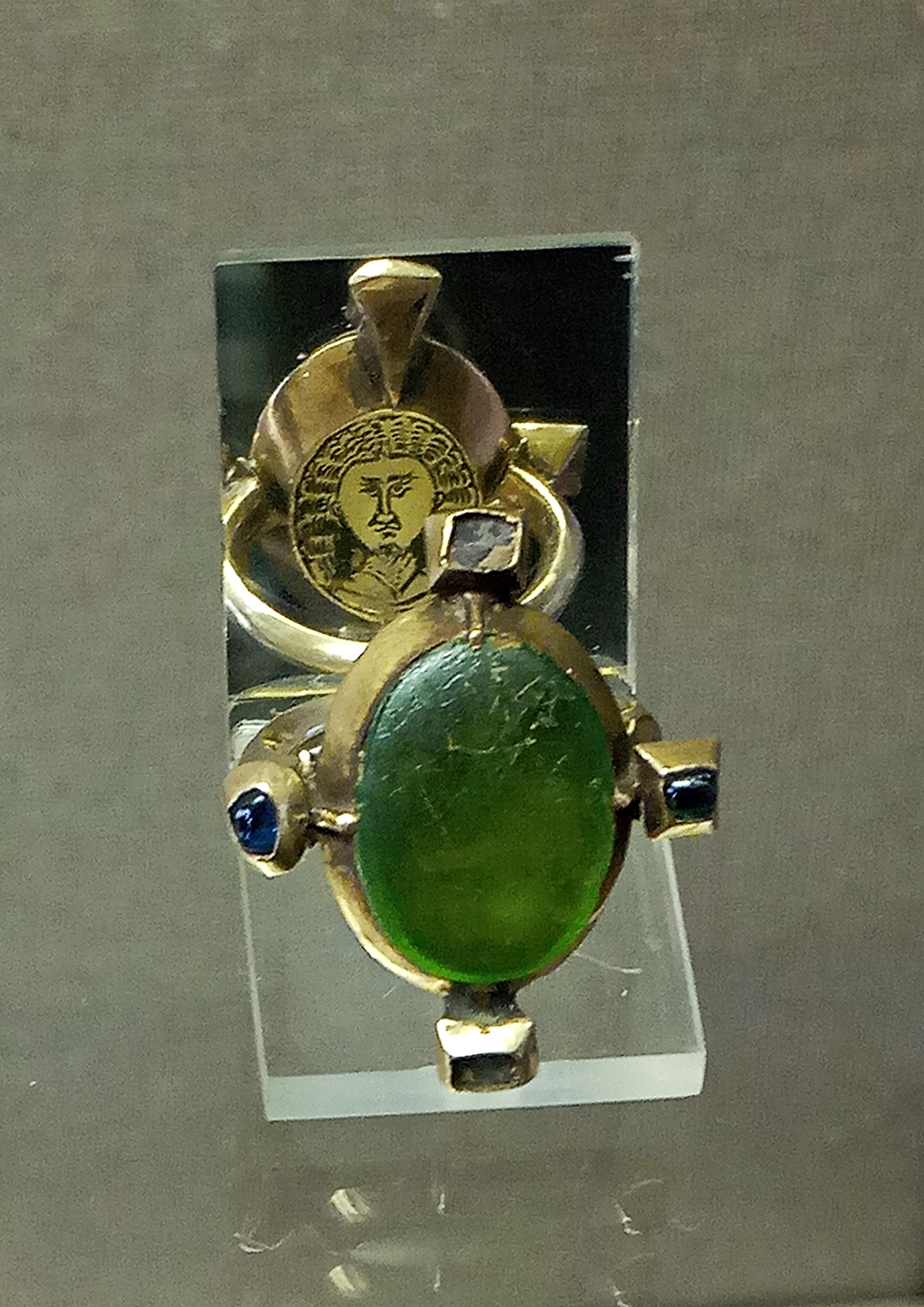 Domschatzkammer Trier Ring Bischof Boemund II.(+ 1367)